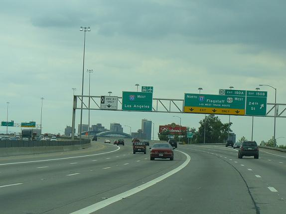 I-10 Exit 150 in Phoenix, Arizona